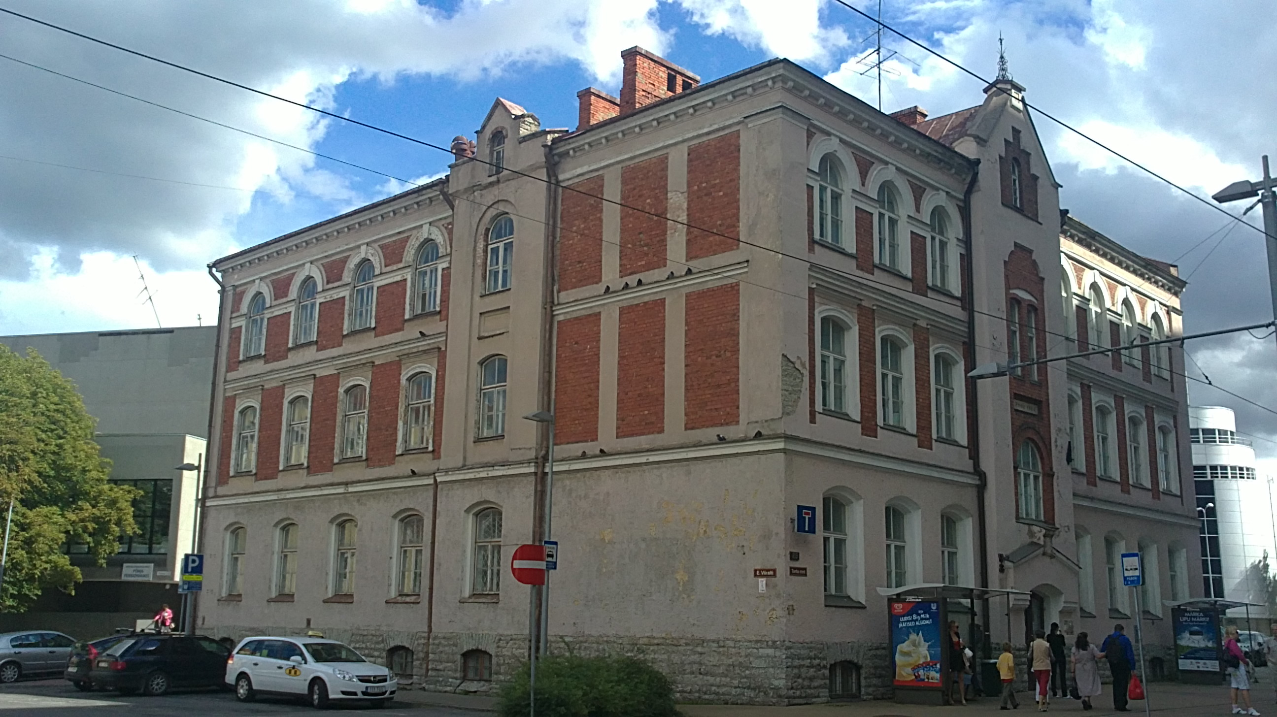 Tallinna Kesklinnas Tartu maantee 23 asuv hoone, endine Tallinna Täiskasvanute Gümnaasiumi hoone